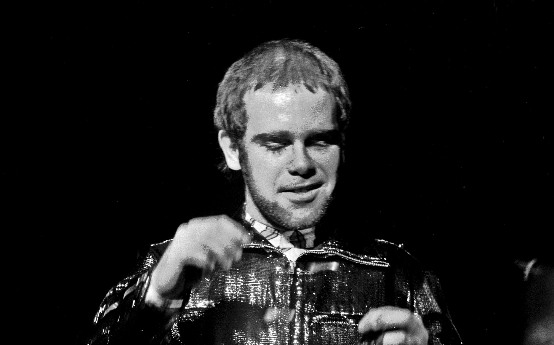 Elton John in der Musikhalle Hamburg, März 1972